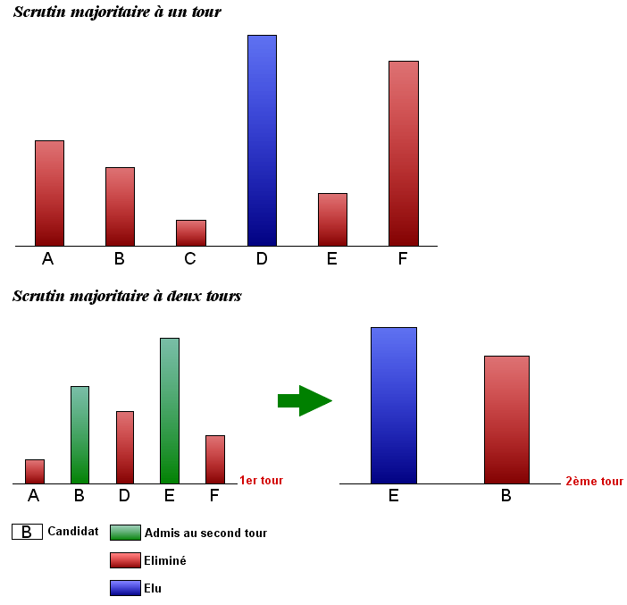 Schéma explicatif des modes de scrutin majoritaire